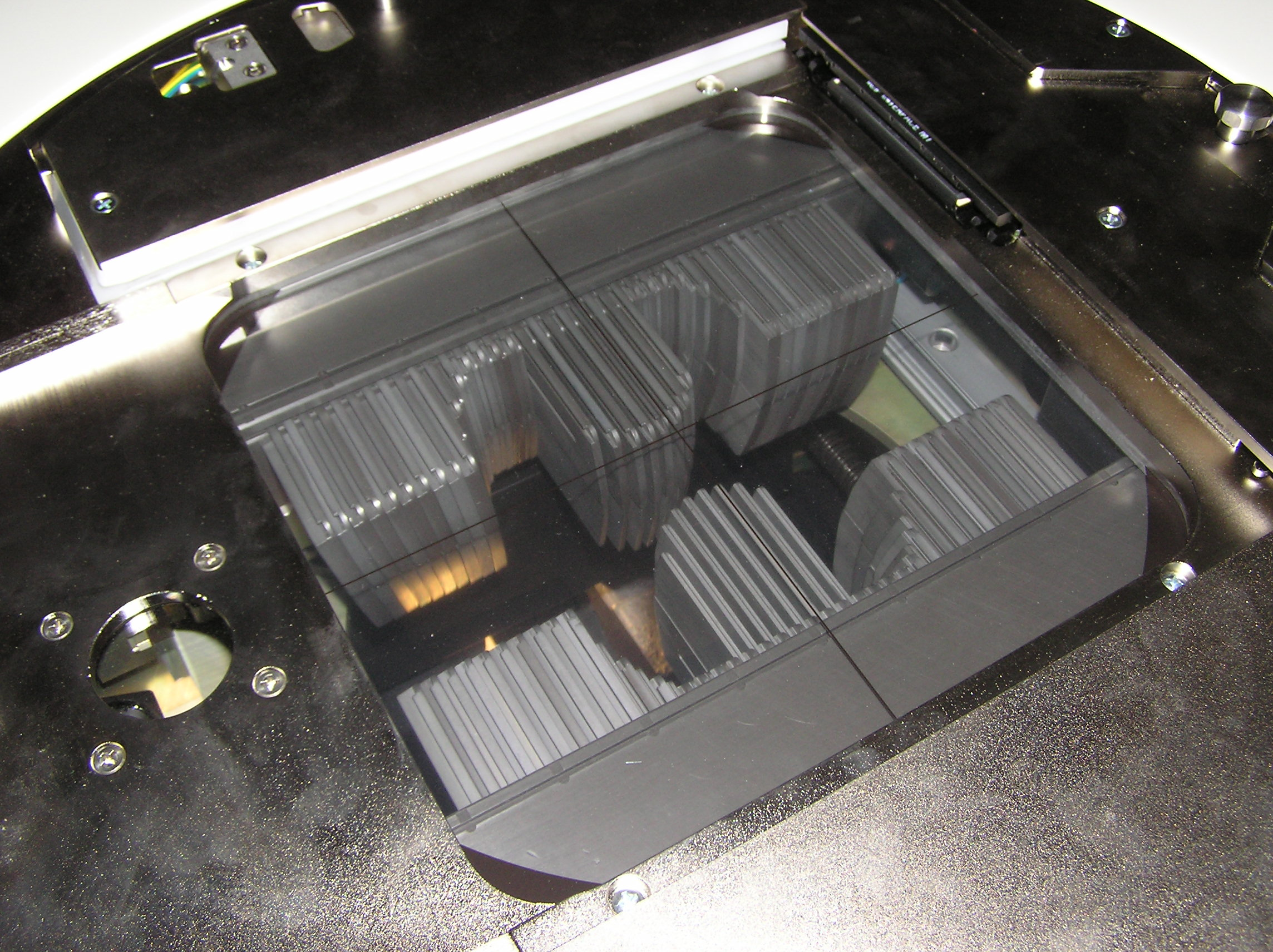 Multi-leaf collimator. FN Motol, Prague, 2006-12-01